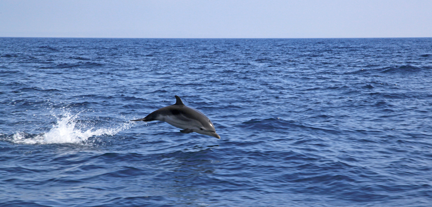 Un dauphin surgit des eaux aux large de Porquerolles, sur le talus Continental